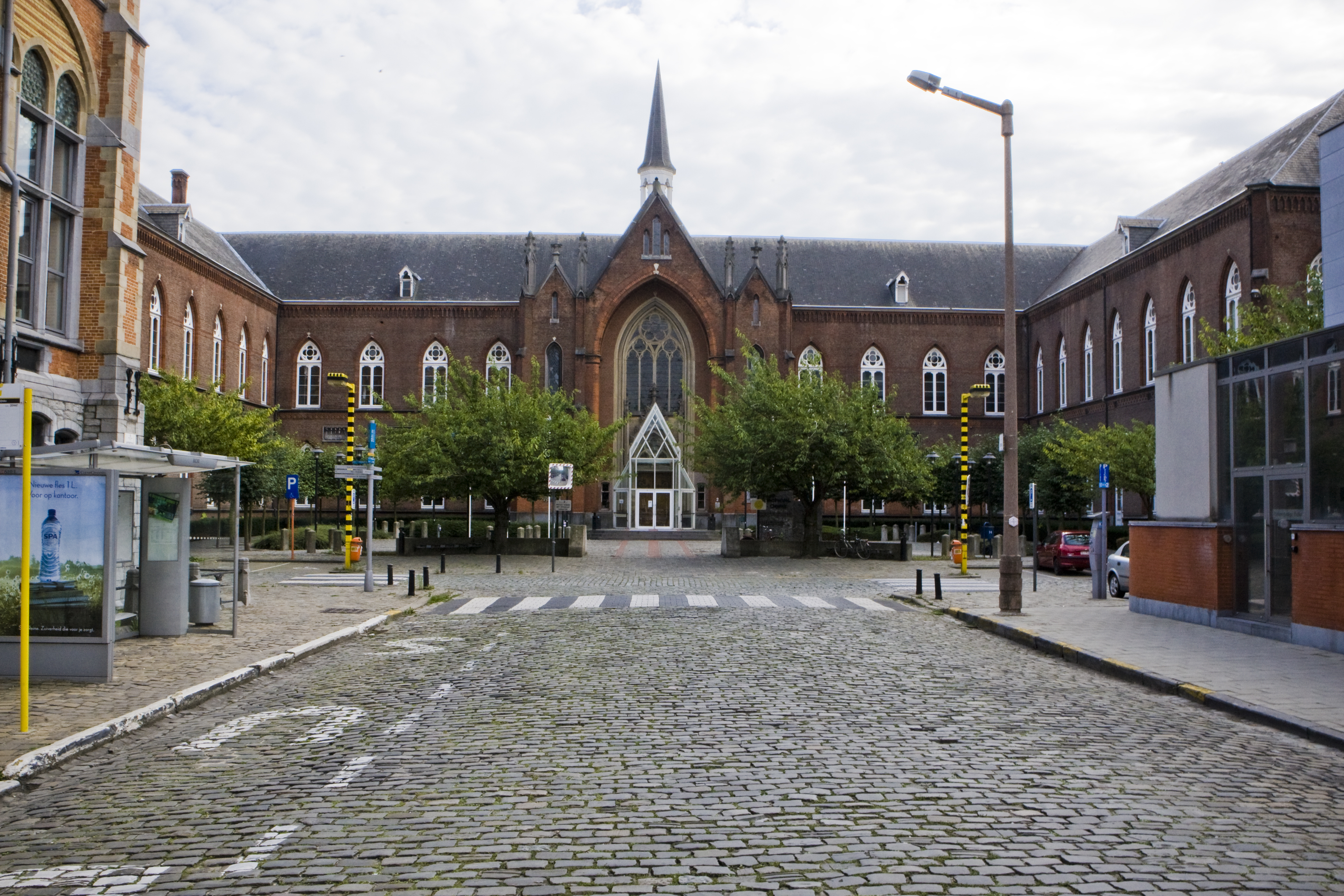 Foto van de Bijlokesite. Foto gedoneerd door UGentMemorie; fotografie Pieter Morlion